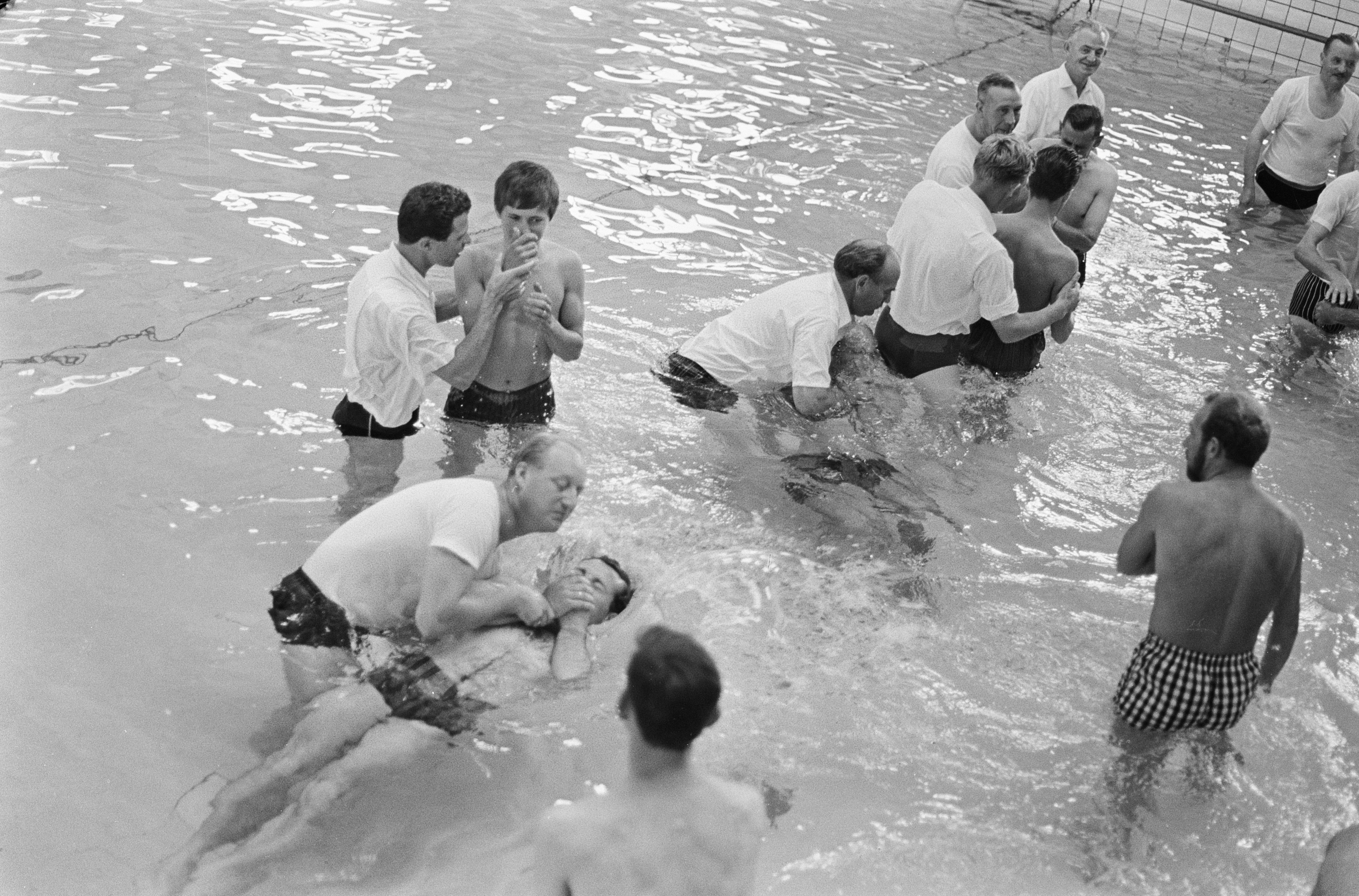 Collectie / Archief : Fotocollectie Anefo Reportage / Serie : [ onbekend ] Beschrijving : Doopplechtigheid in Zuiderbad van Jehova-getuigen Datum : 19 augustus 1966 Trefwoorden : Doopplechtigheden, zwembaden Fotograaf : Nijs, Jac. de / Anefo Auteursrechthebbende : Nationaal Archief Materiaalsoort : Negatief (zwart/wit) Nummer archiefinventaris : bekijk toegang 2.24.01.05 Bestanddeelnummer : 919-4638